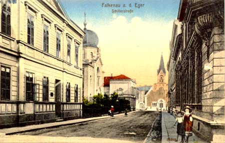 Ansichtskarte von Sokolov